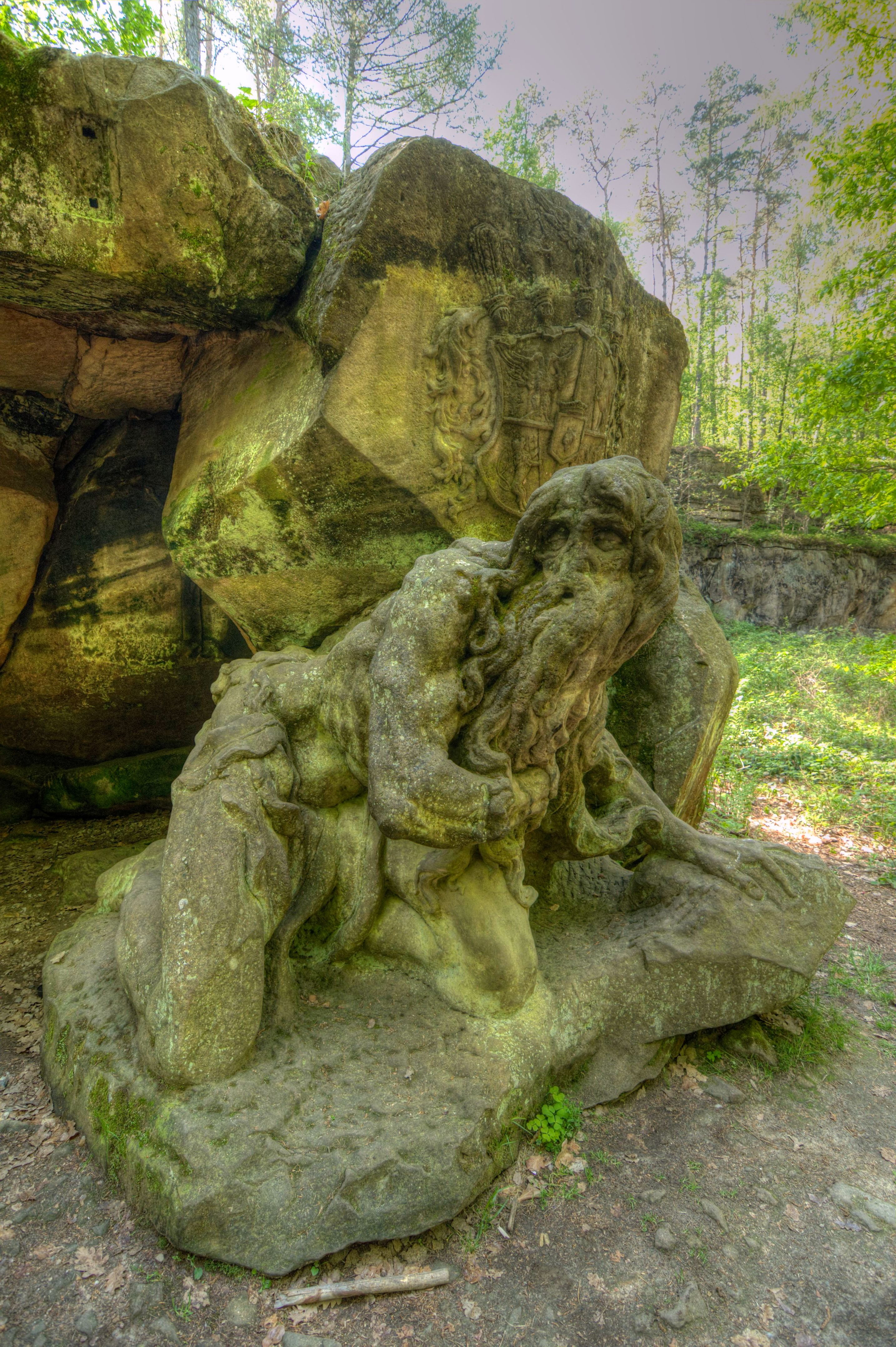 Nový les u Kuksu (Betlém). Socha poustevníka Juana Garina před jeskyní